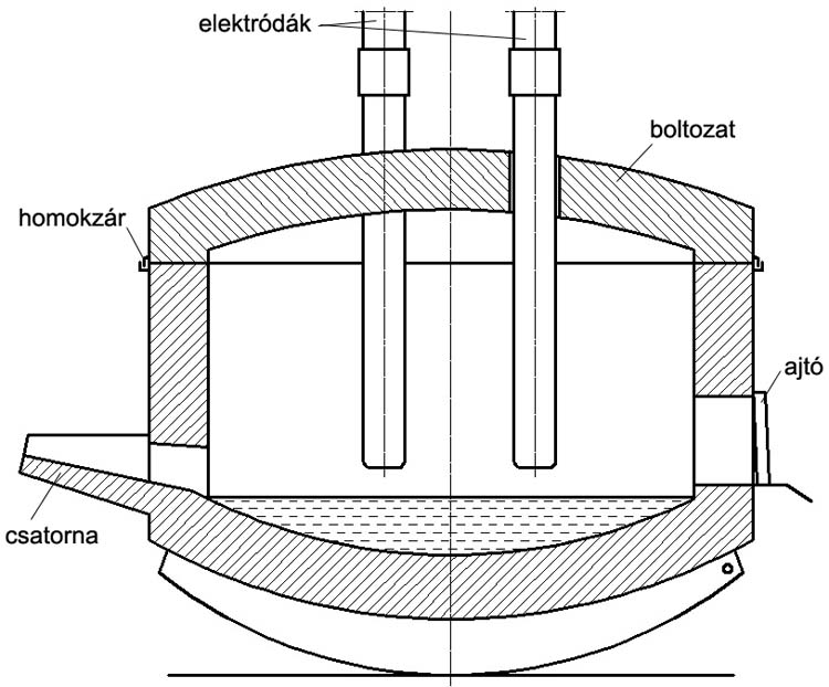 Héroult-kemence felépítése